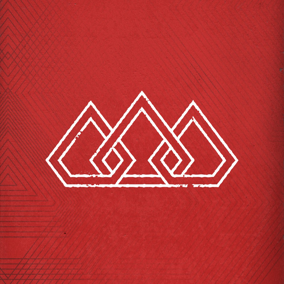 Es el logo de The Score